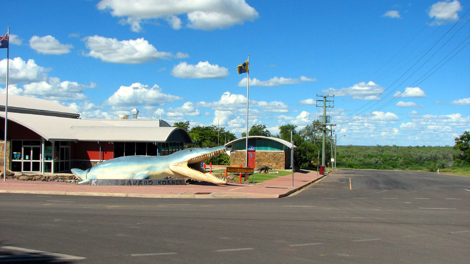 Richmond, Queensland - Dinosaur Museum